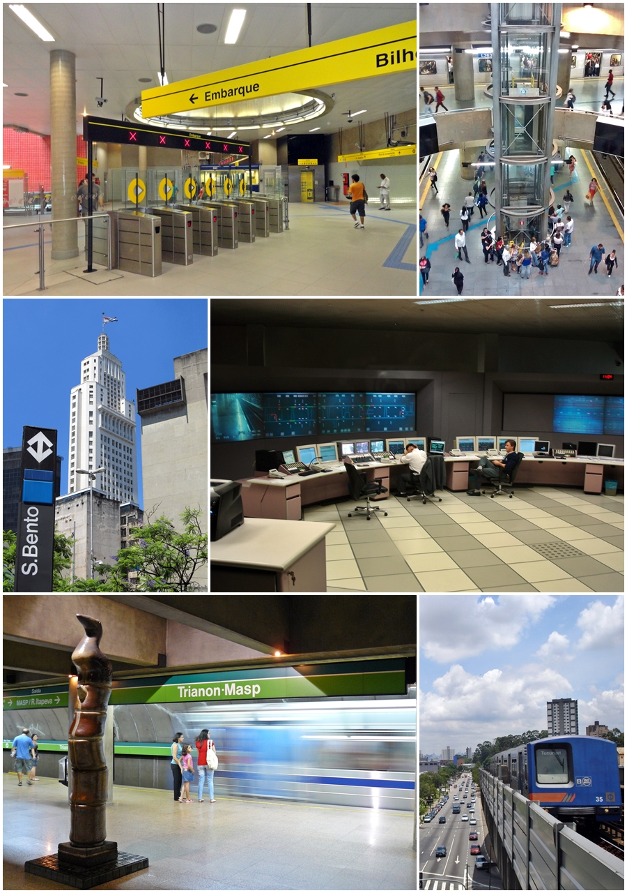 Montage of São Paulo Metro